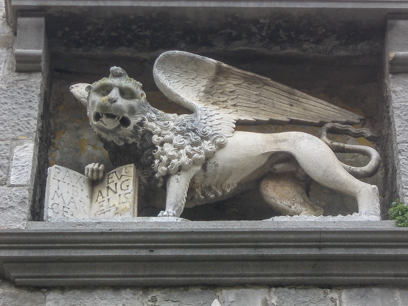 Skulptur des Markuslöwen über dem Portal der Kirche Mariä Geburt in Labin, Kroatien.